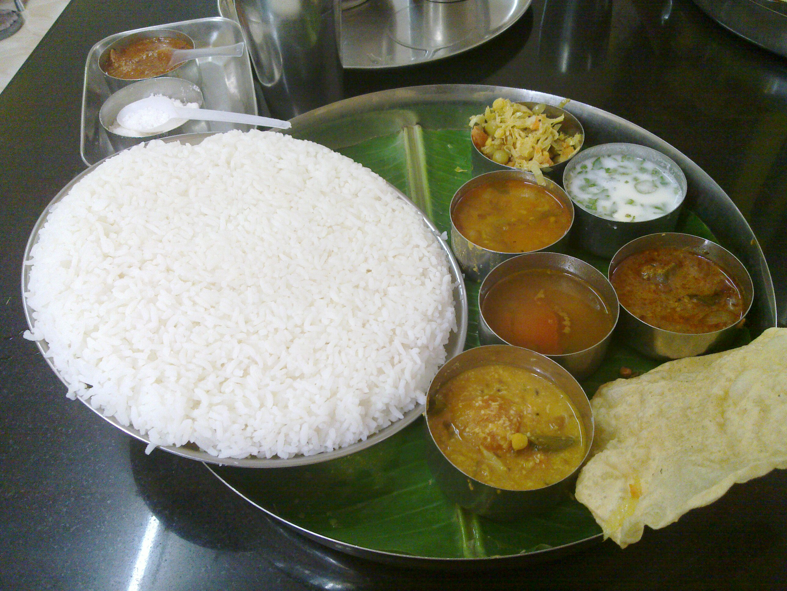 A -SOUTH INDIAN FOOD in a hotel